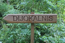 Nuoroda į Dijokalnį